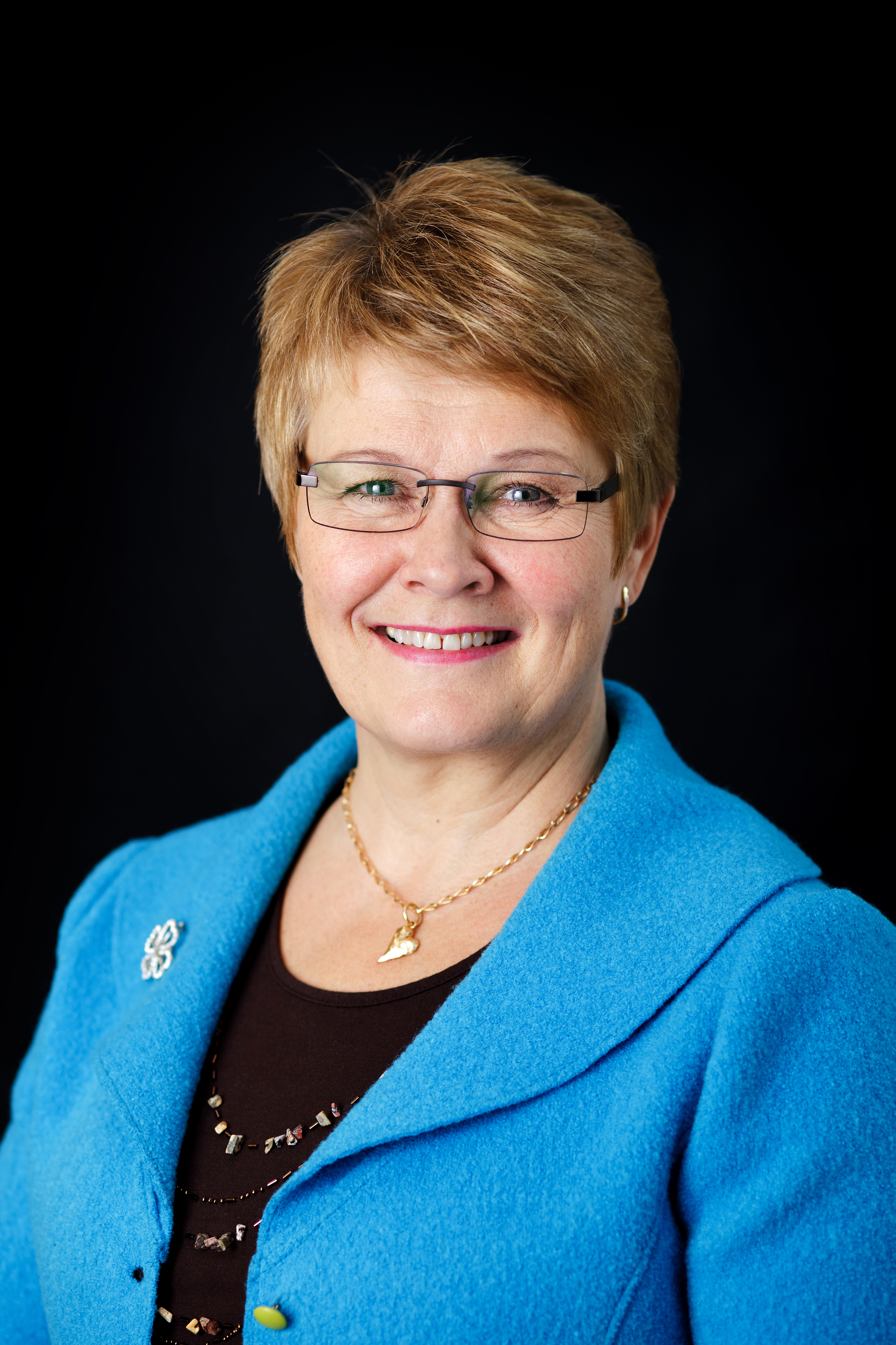 Energi- och näringsminister Maud Olofsson. Sverige